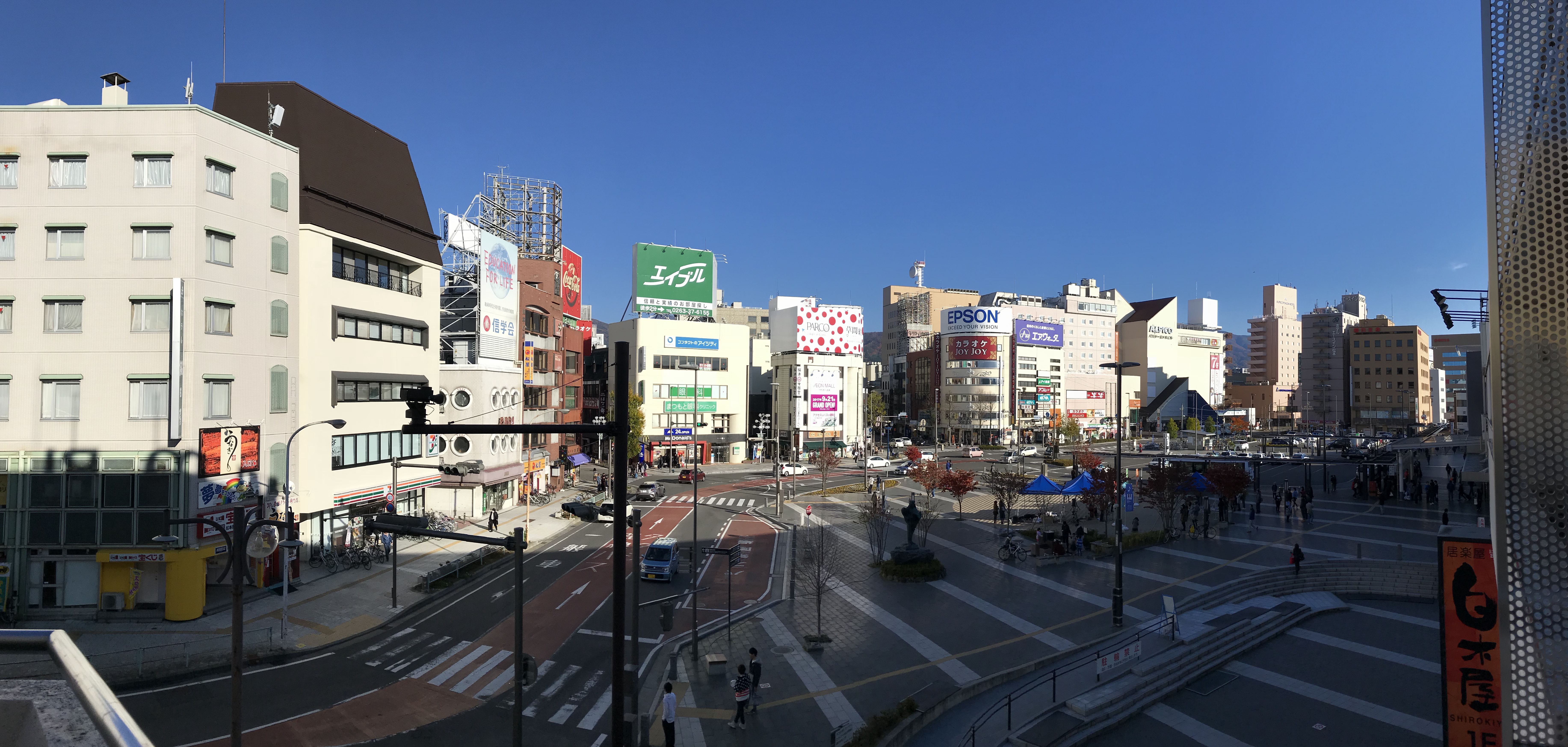 MIDORI松本、3階階段より撮影。